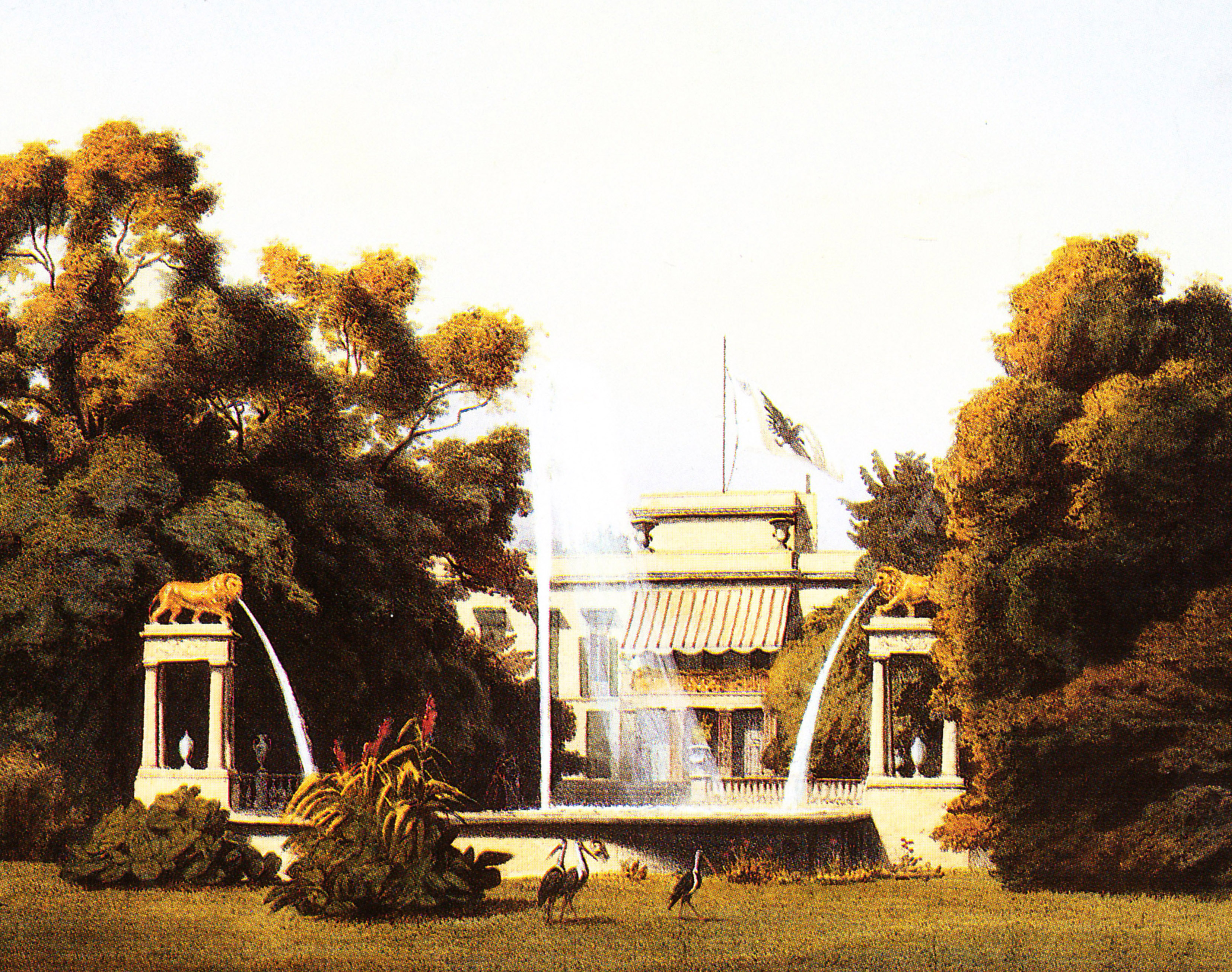 Ansicht der Löwenfontäne im Park Klein-Glienicke, unbekannter Künstler, um 1840